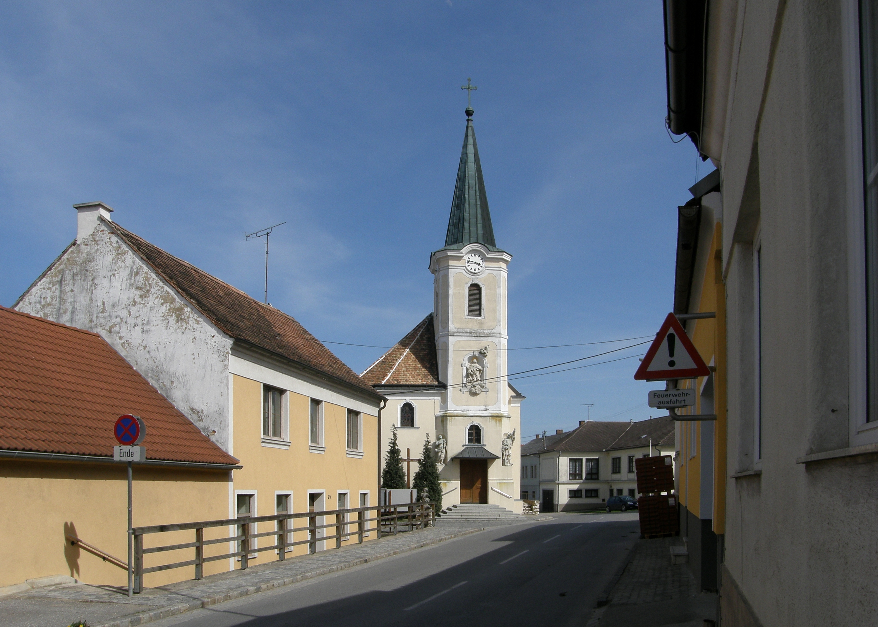 Kath. Pfarrkirche hl. Koloman